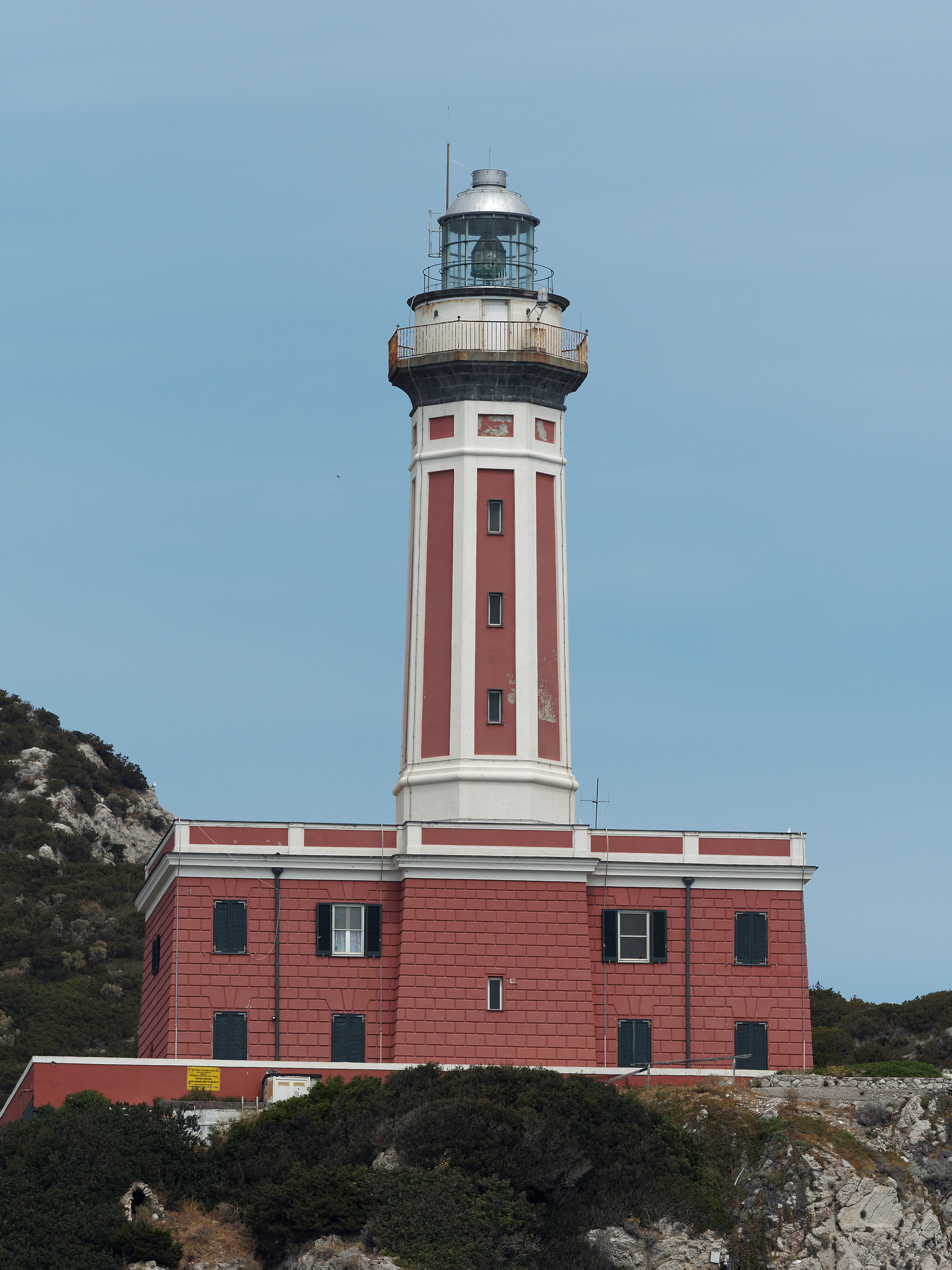 Das Leuchtfeuer Faro Punta Carena auf der Südwestseite der Insel Capri, aus nordwestlicher Richtung, Kampanien, Italien.